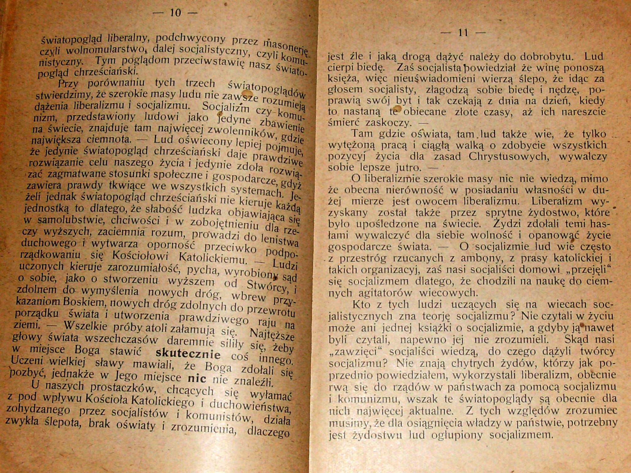 Stanisław Krzyżowski, Rozmyślania w czterdziestą rocznicę encykliki „Rerum novarum”, wydanej 15 maja 1891 r. przez papieża Leona XIII, Pszczyna 1931